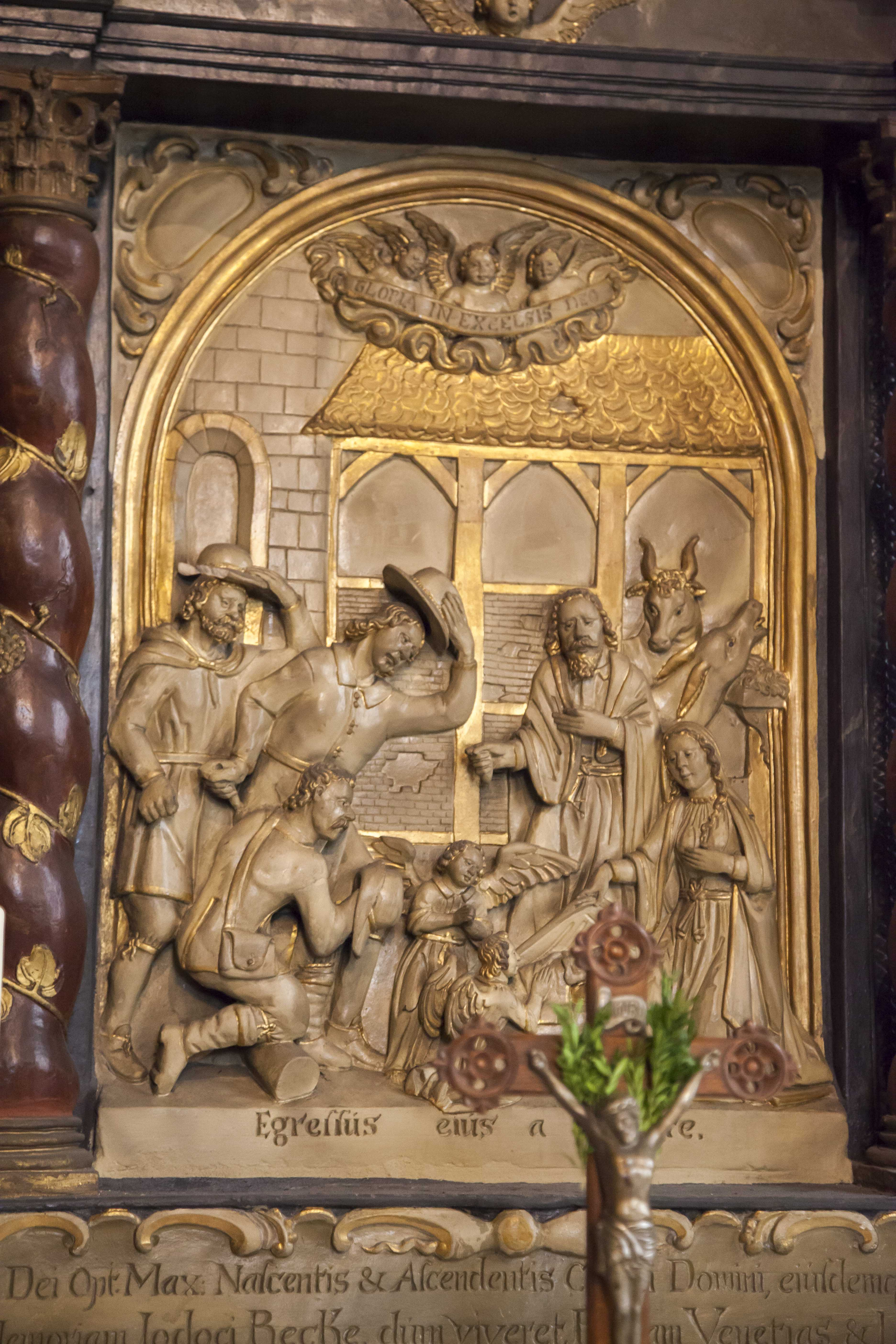 Bönkerskapelle Rheine - Epitaph Altar - Geburt